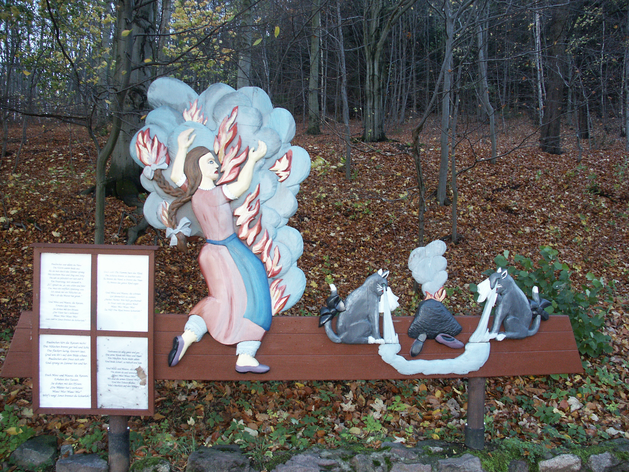 Struwwelpeter-Park Tabarz, geschnitzte Märchenfiguren "Die gar traurige Geschichte mit dem Feuerzeug"